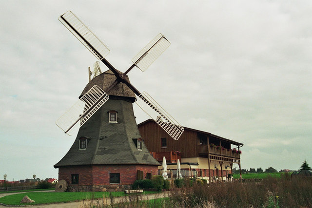 Kühlungsborn: Blick zur Windmühle